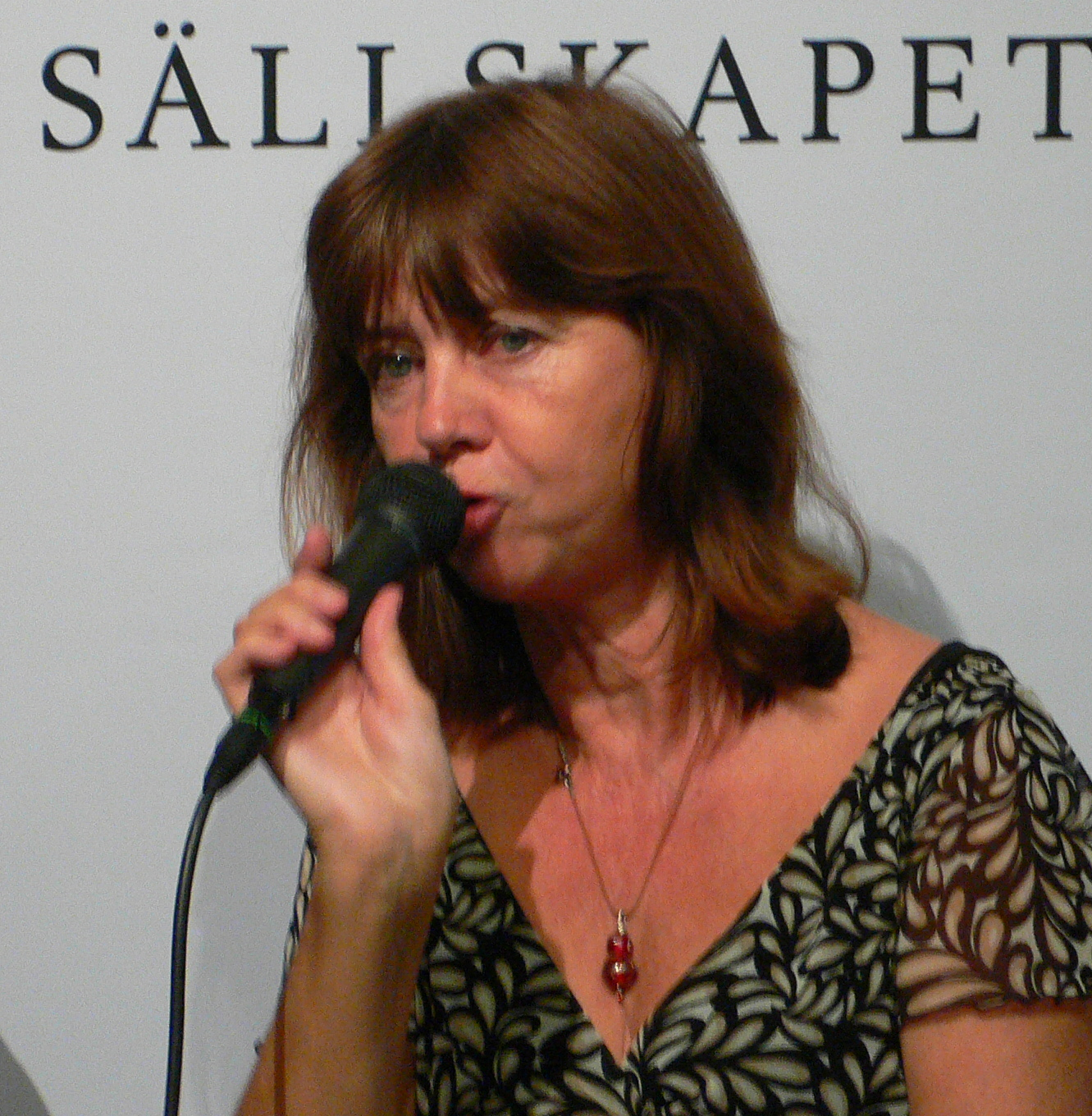 Ylva Eggehorn at Gothenburg Bookfair 2007, Ylva Eggehorn på Göteborgs bok- och biblioteksmässa 2007